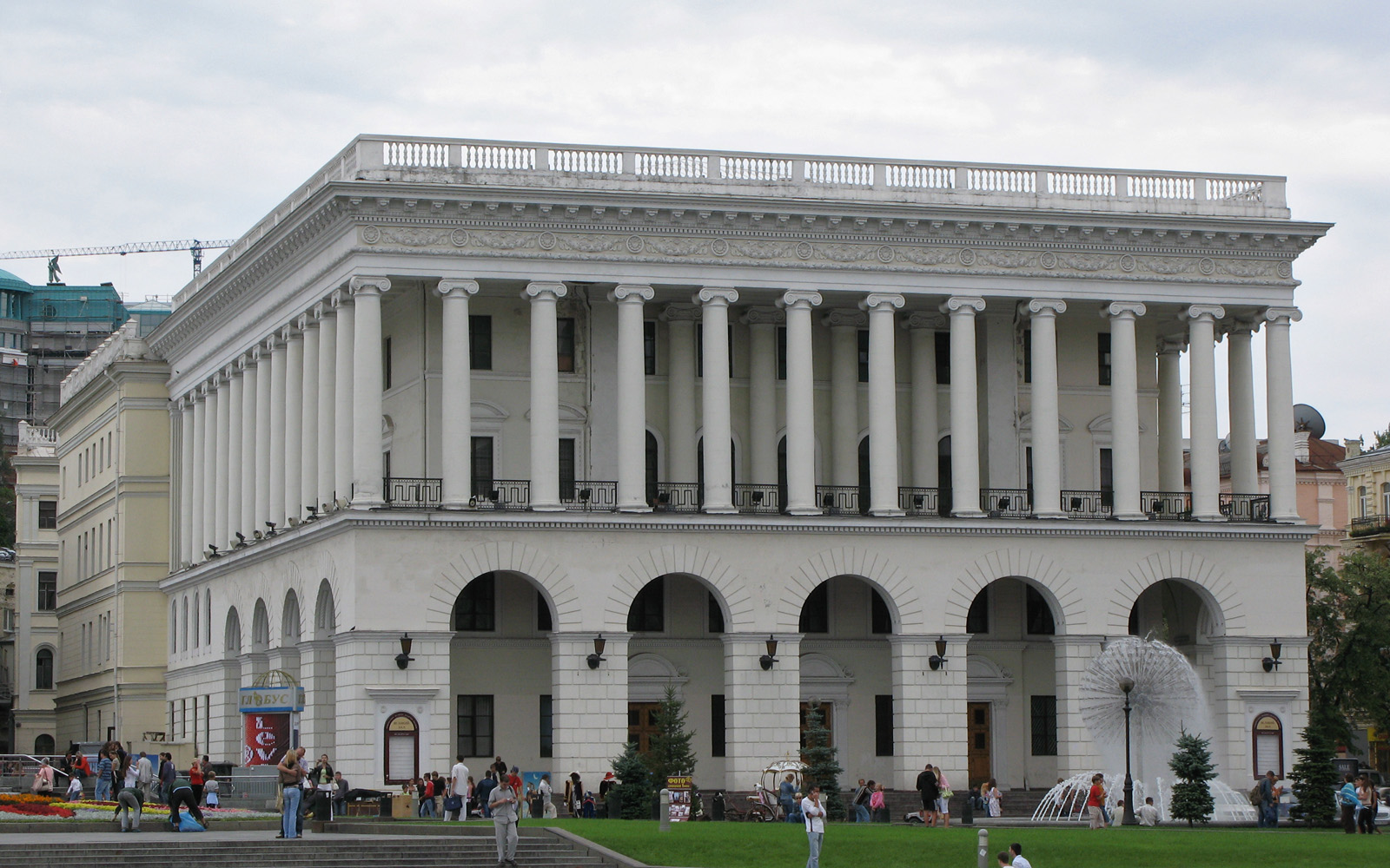 Київська консерваторія